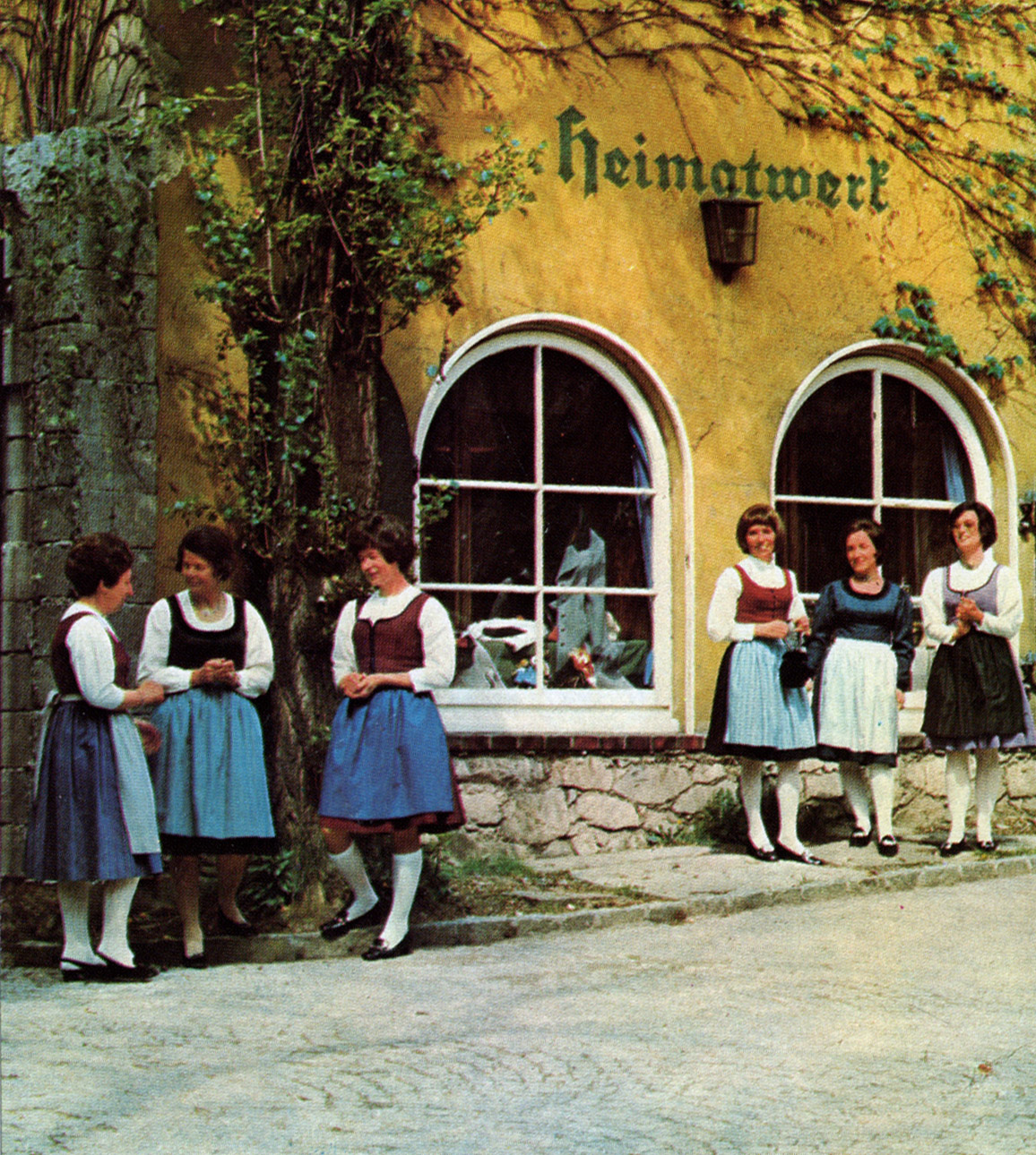 Die erste Filiale des Steirischen Heimatwerkes im Stöckel des Steirischen Heimatwerkes, Paulustorgasse 13a 8010 Graz